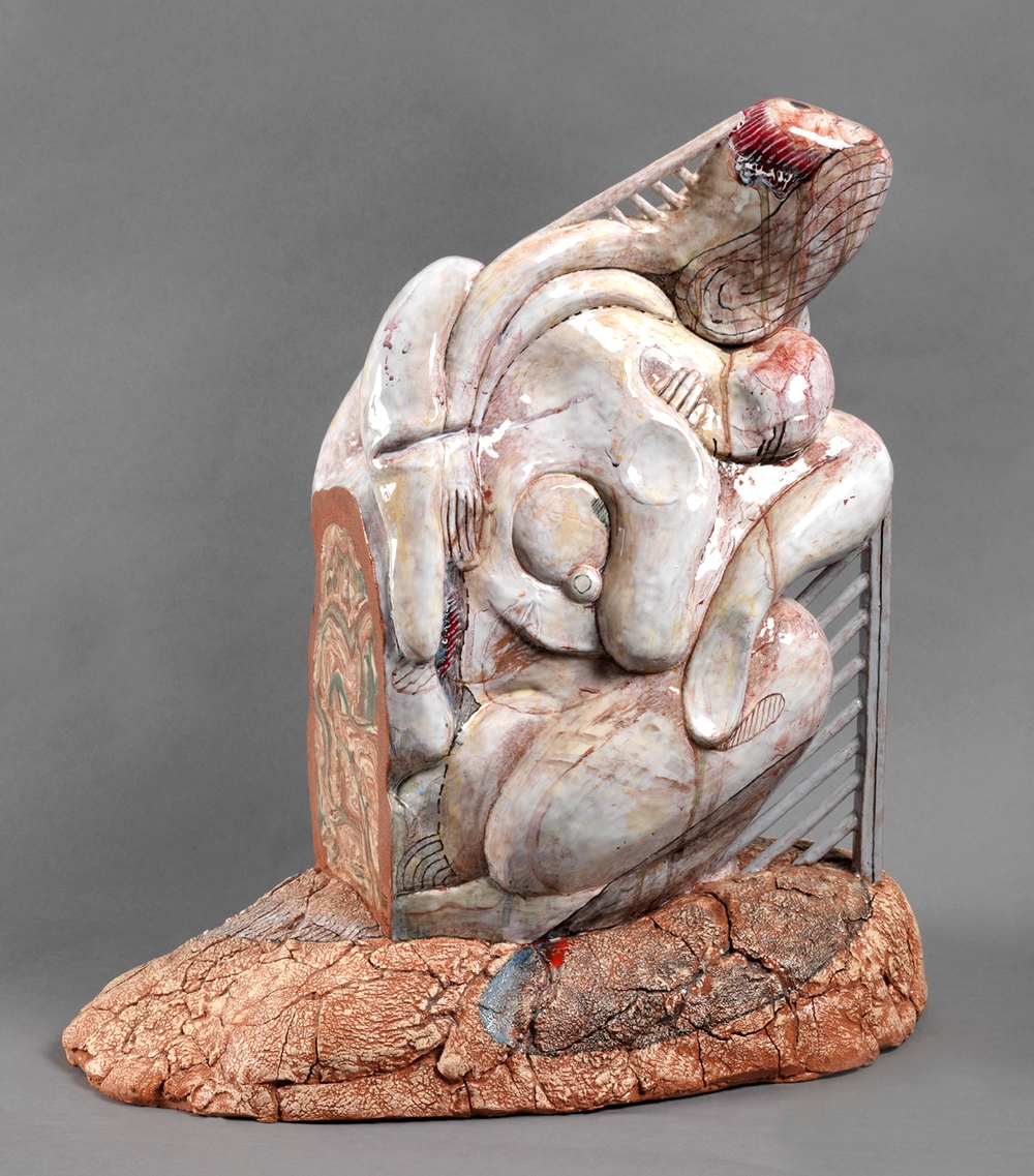 Sculpture: Grande étreinte II